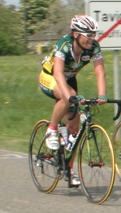 De Jan Kuycks 2007 a Liège-Bastogne-Liège.